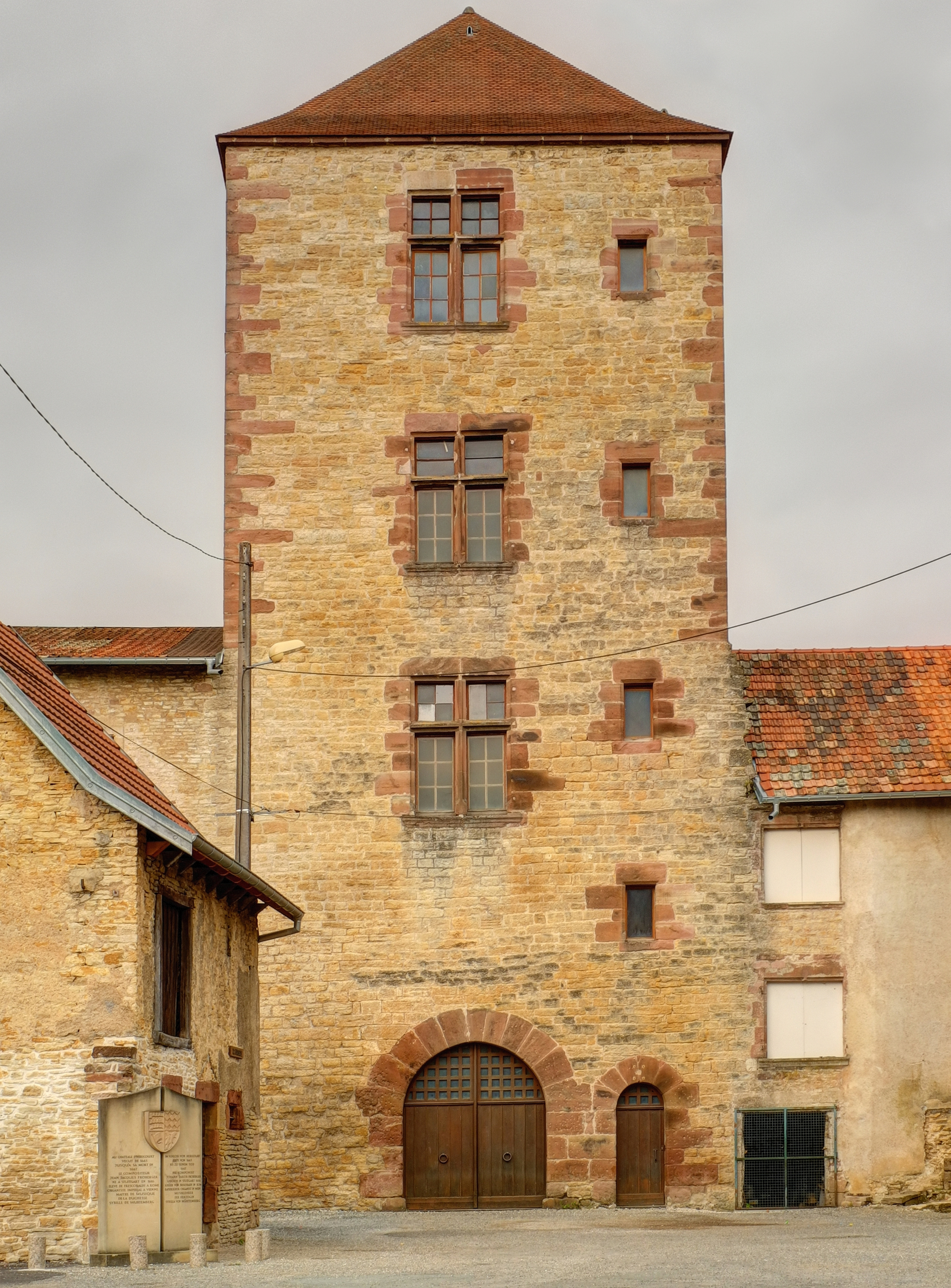 Château d'Héricourt, classé Monument Historique sous le n° PA00102193 (HDR).